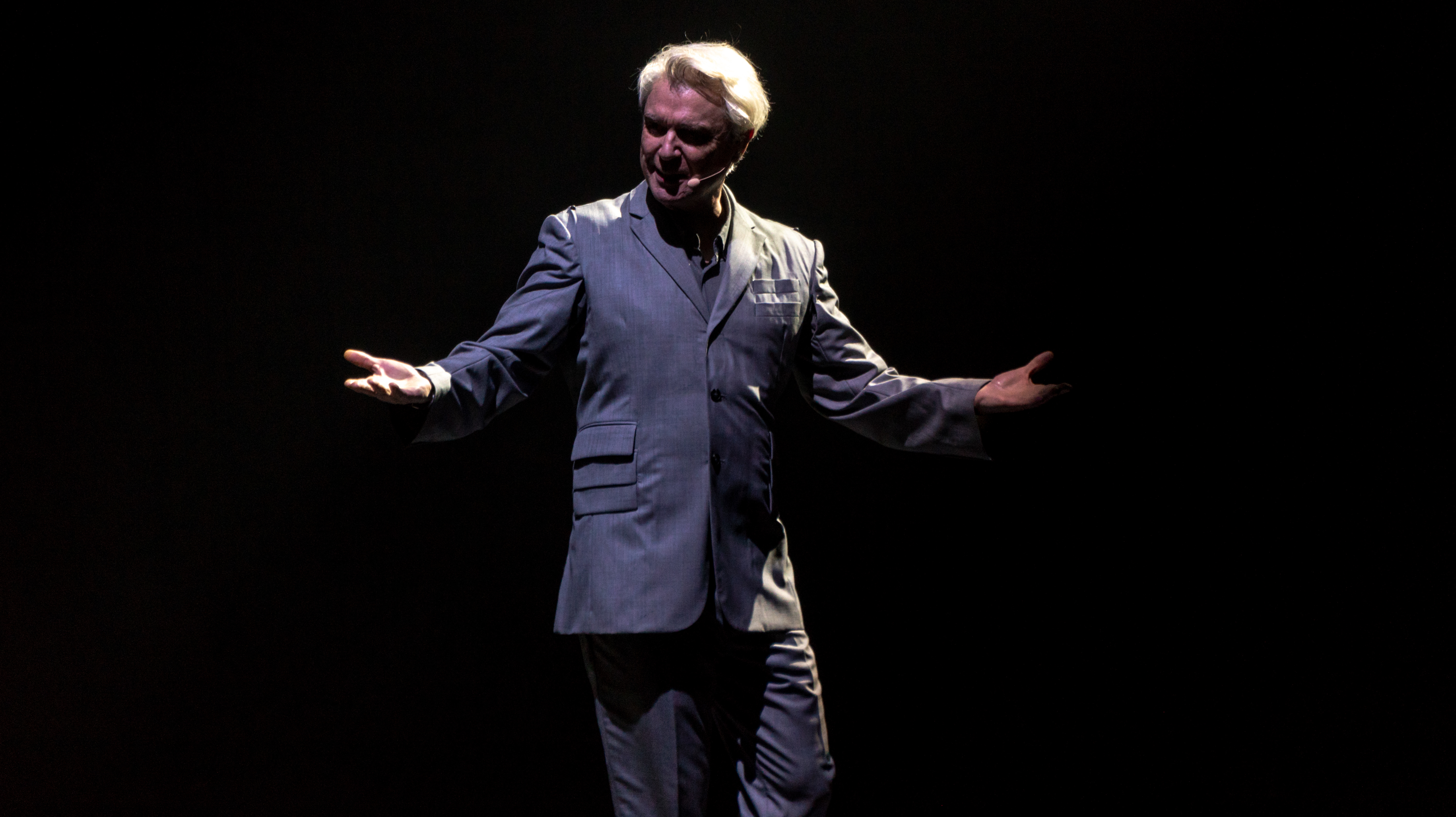 DByrneSDiego120418-13